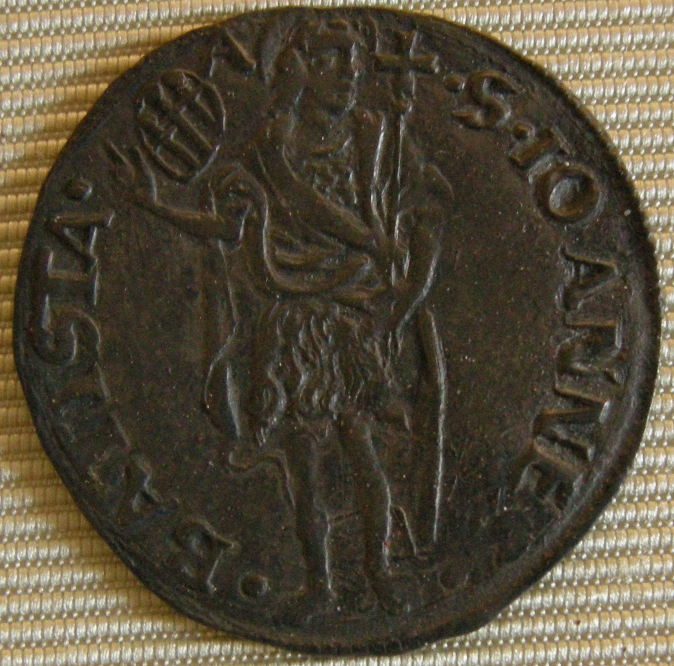 503 primo semestre, grossone da 7 soldi con stemma mannelli